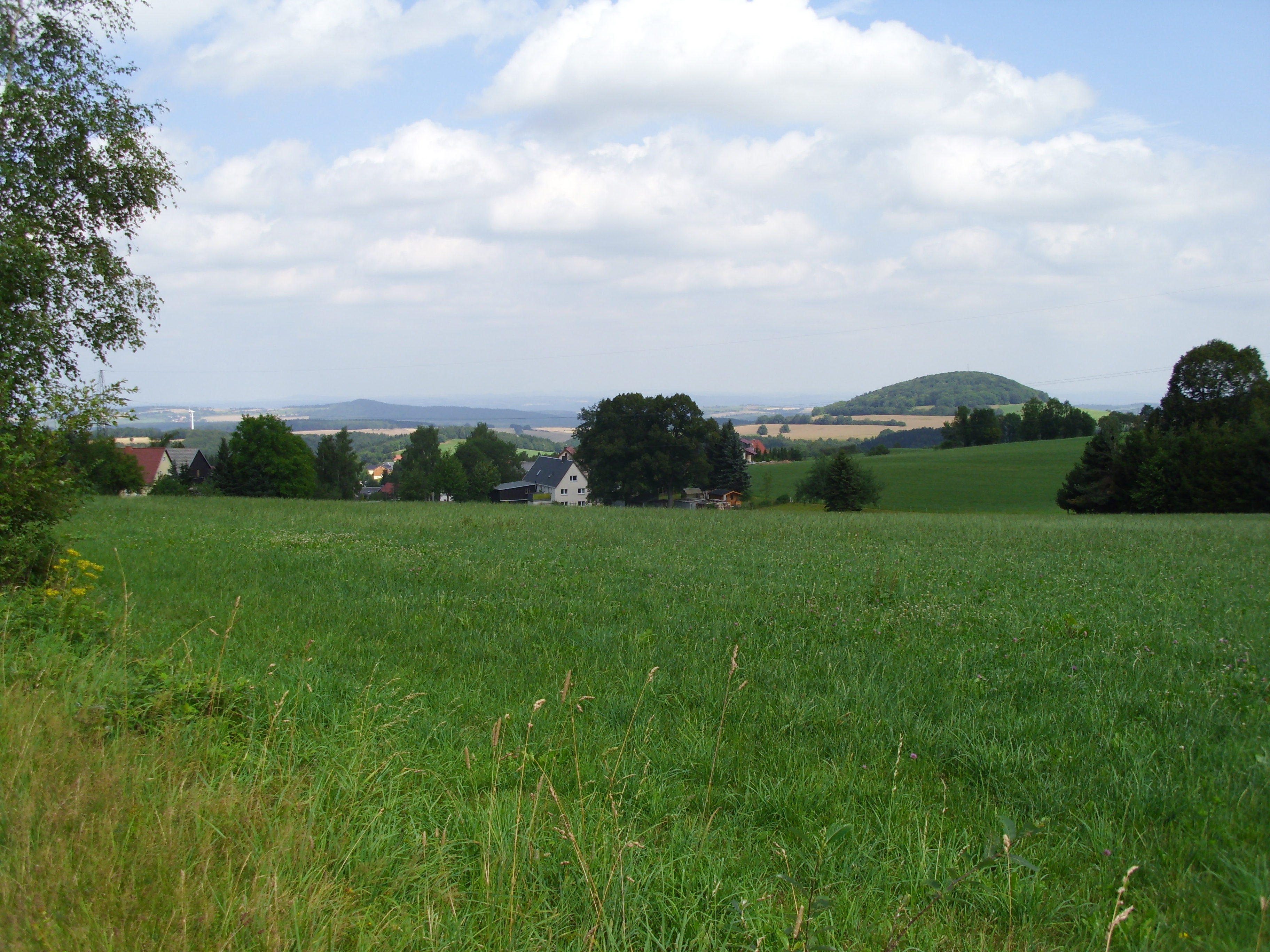 Von der Hochwaldstraße blickt dieses Bild über Oberfrauendorf bis zum Luchberg.